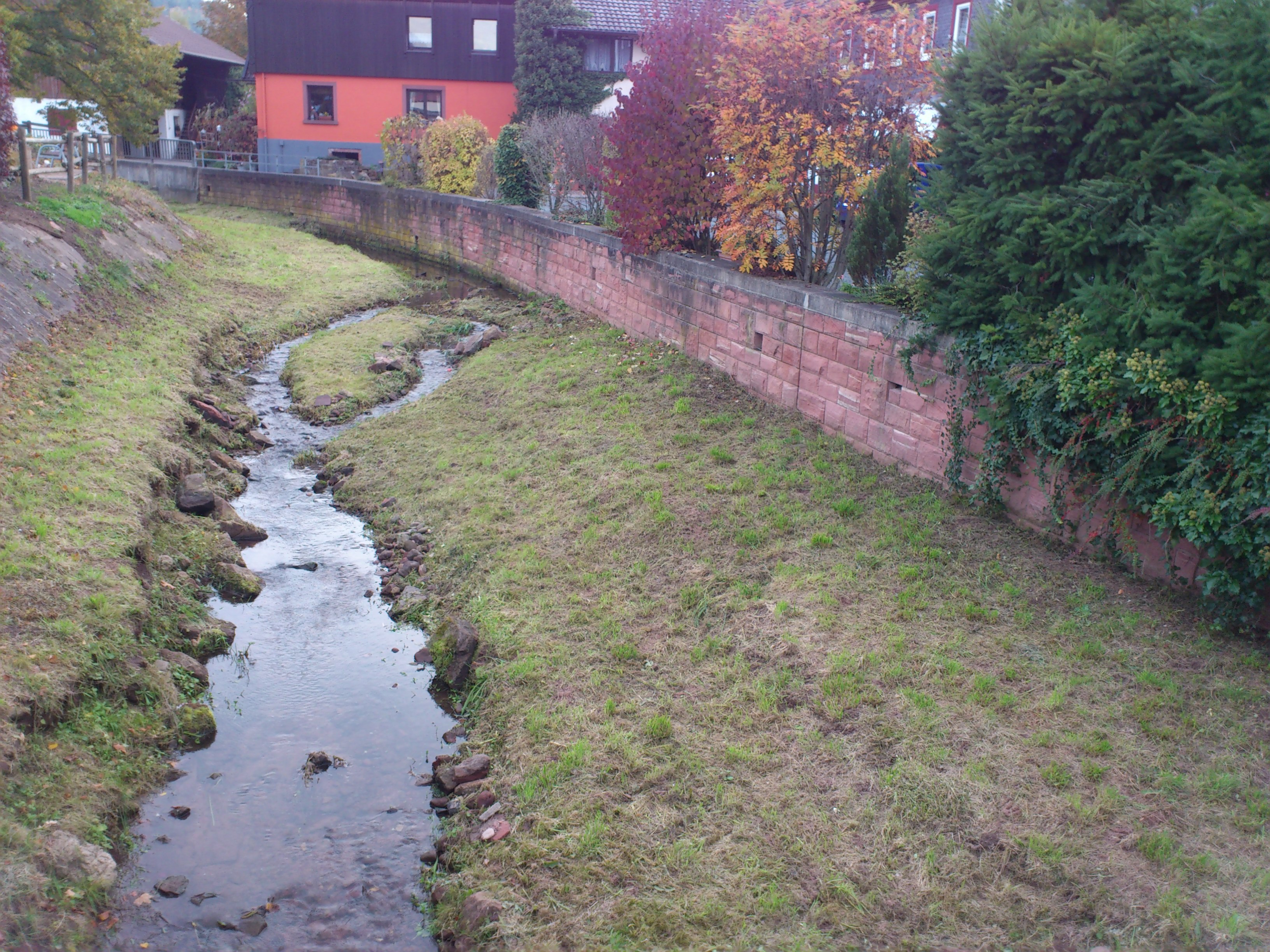 Der Weilbach in Weilbach